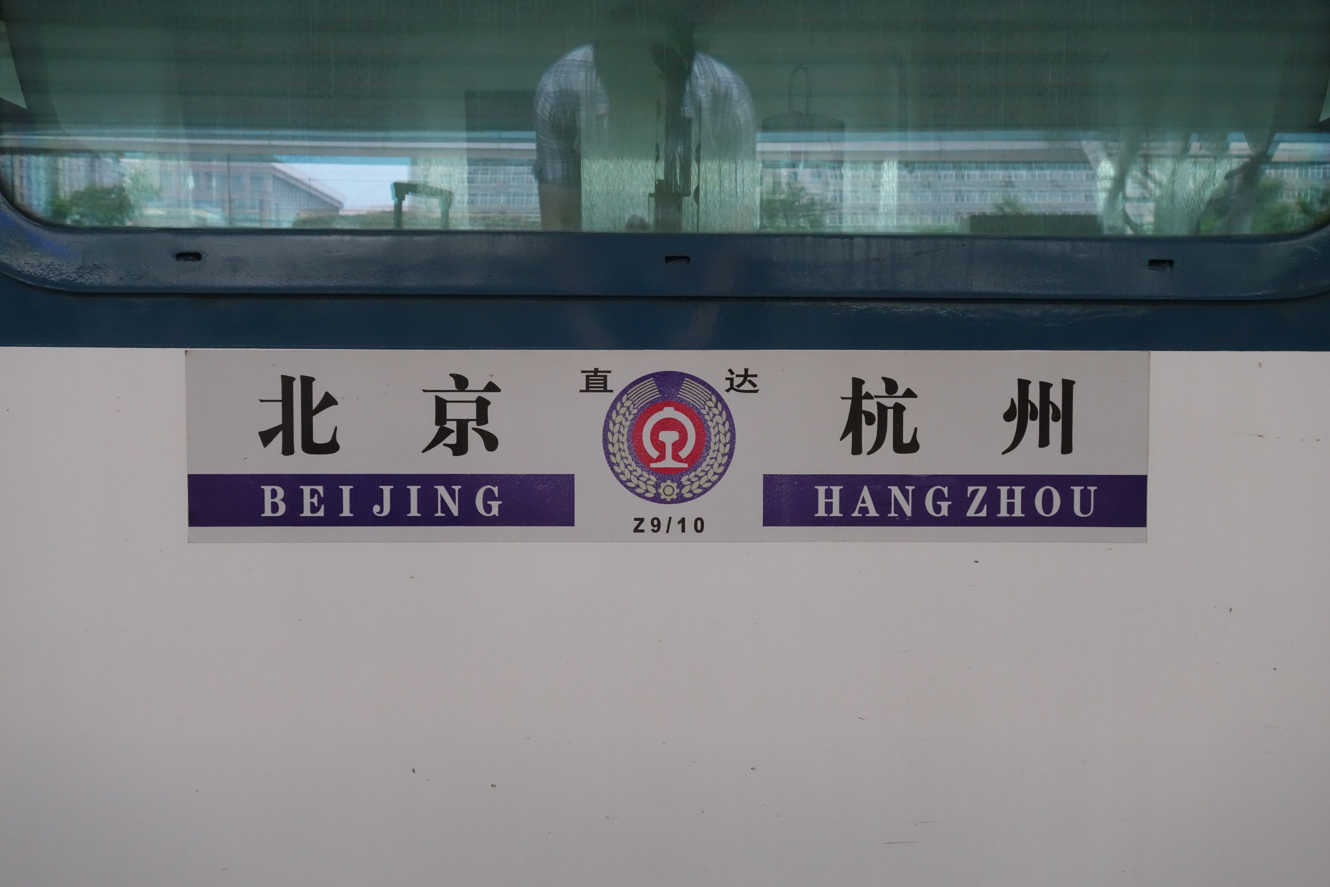 Z9/10次水纸